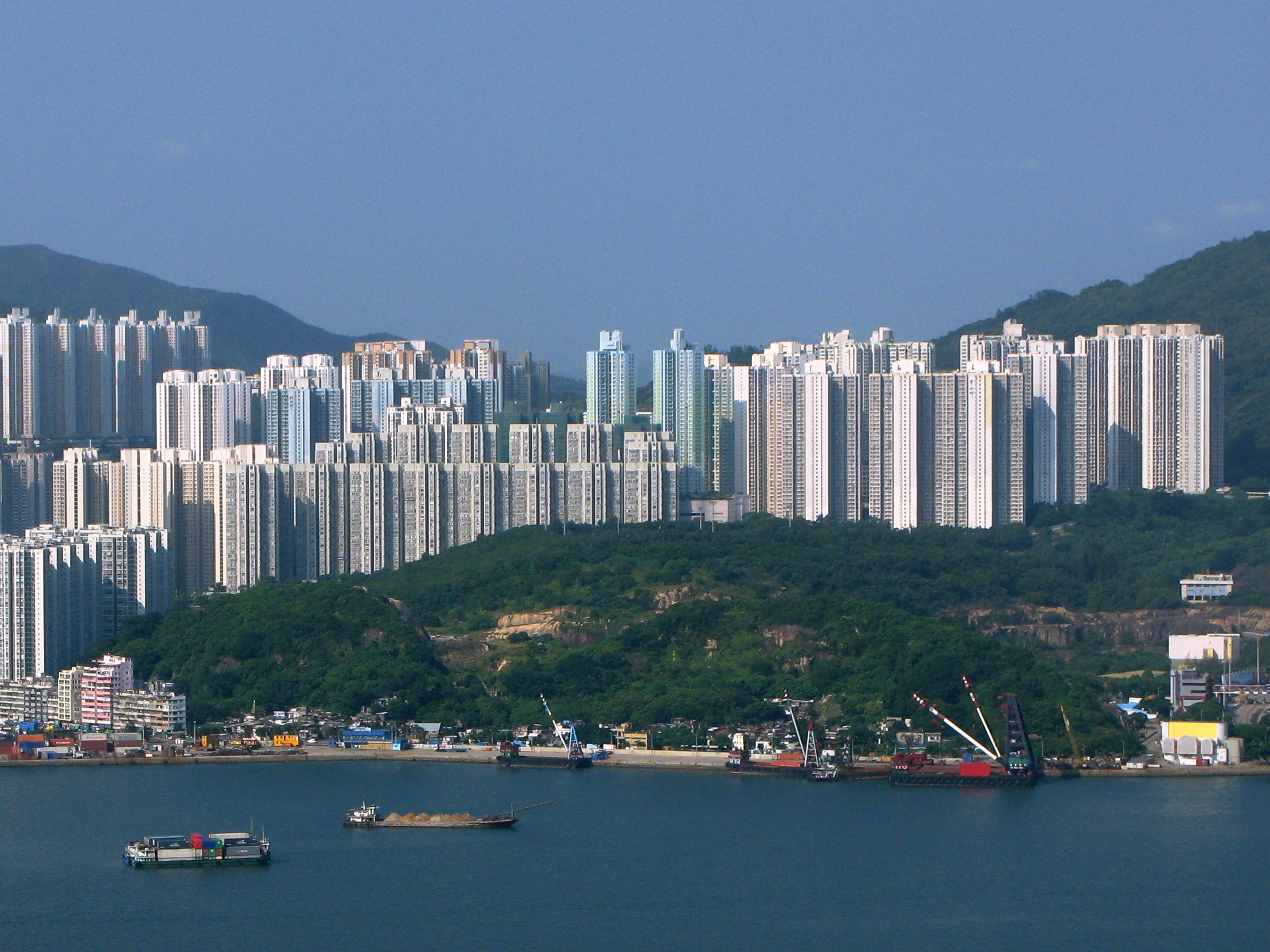 Lam Tin 藍田